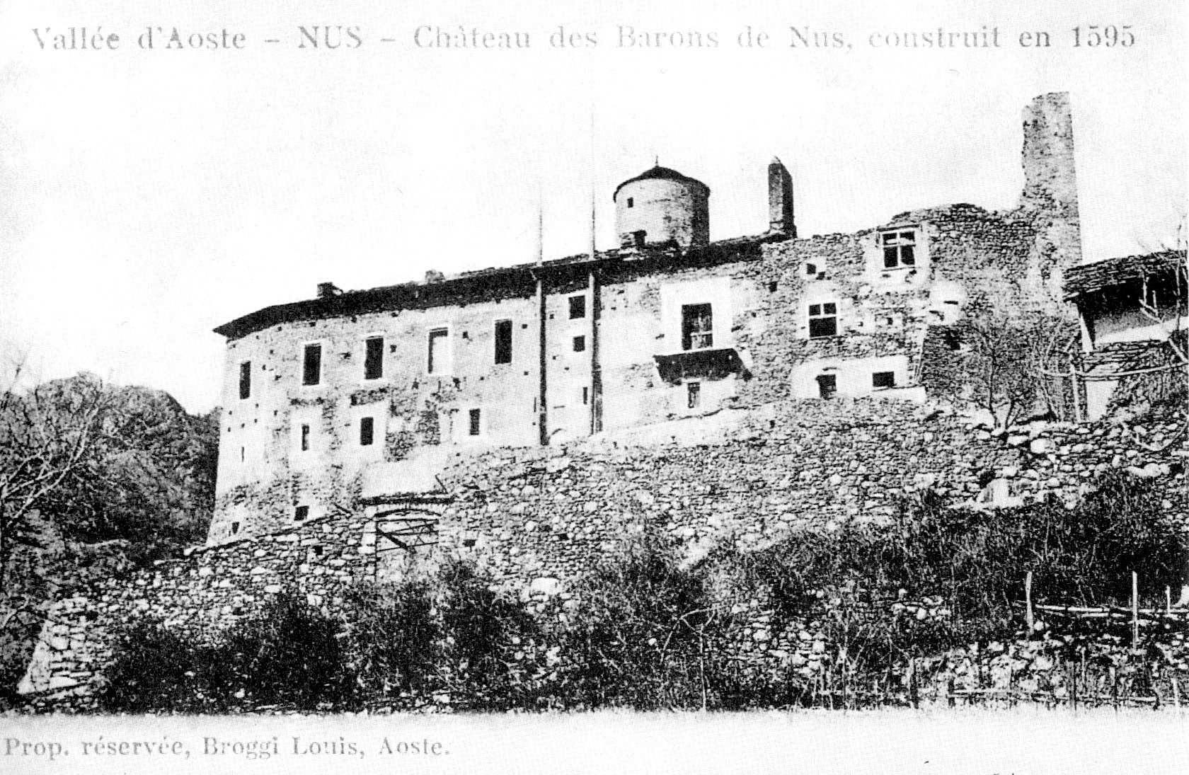 Lato sud del Castello di Nus nel 1905, Nus, Valle d'Aosta, Italia. Alcuni elementi architettonici sono oggi crollati. (BREL, Fonds Domaine.)